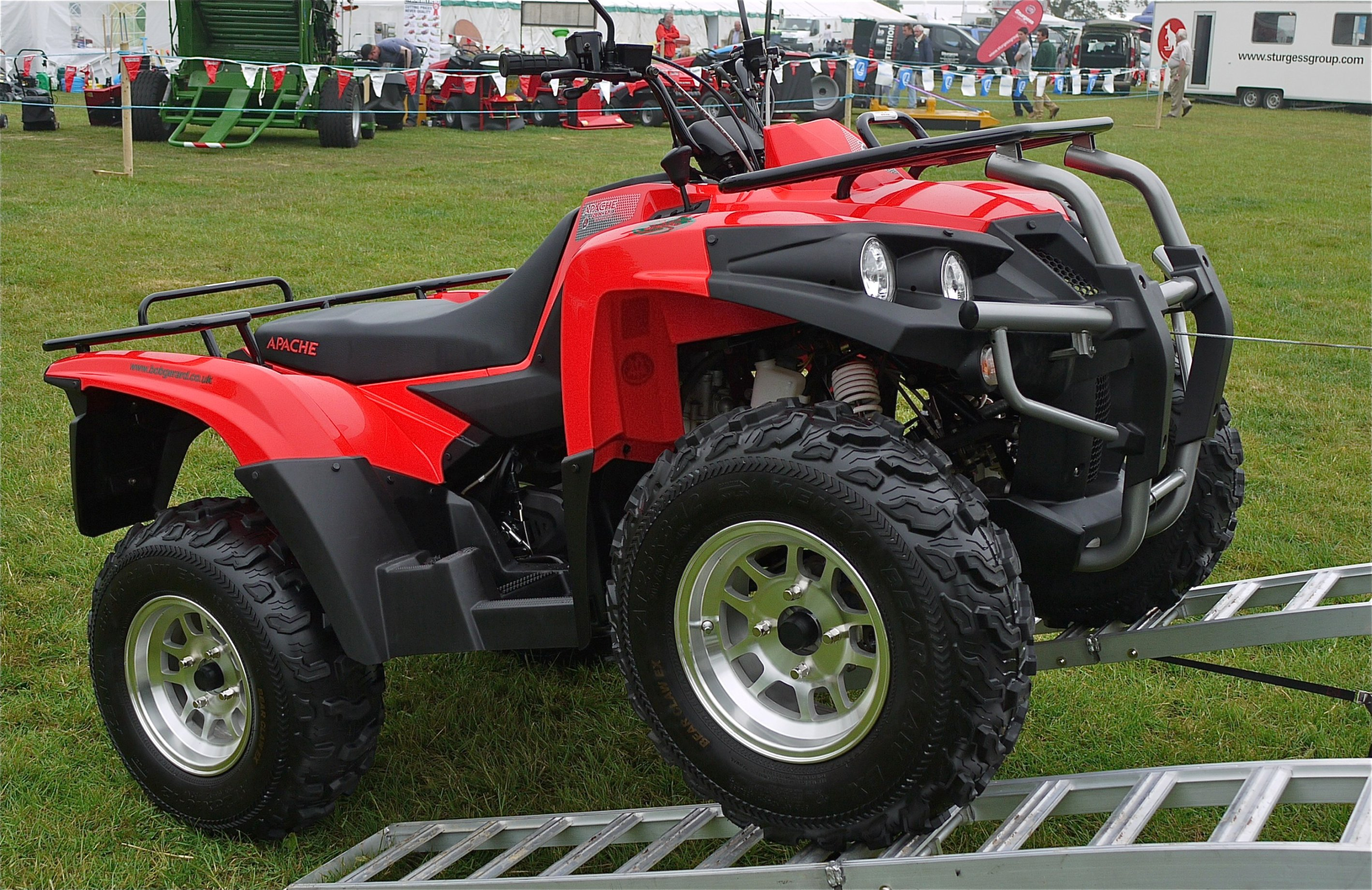 Panasonic G1 14-45 Lens